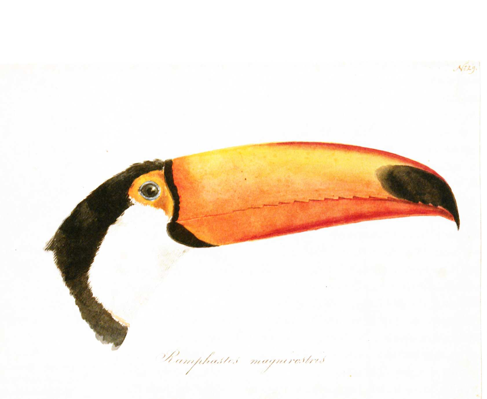 Aimé-Adrien Taunay Ramphastos 1826